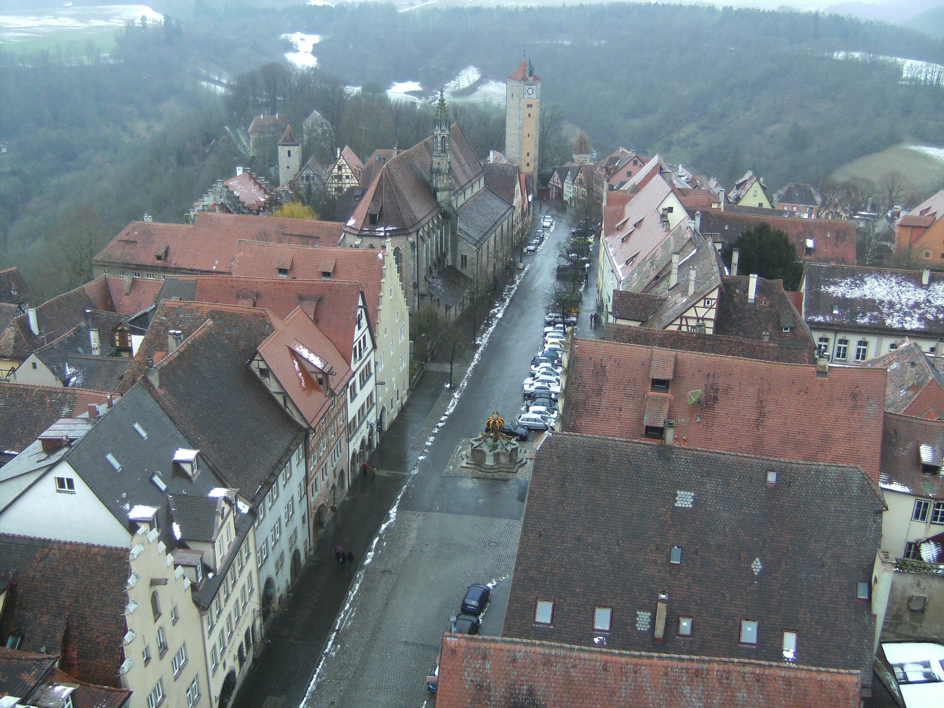 Rothenburg ob der Tauber, rigardo el la urbodomo; centre: paske ornamita fontano. (eo) / de: Rothenburg, vom Rathaus aus gesehen; in der Mitte: Osterbrunnen. / en: Rothenburg, view from Townhall.